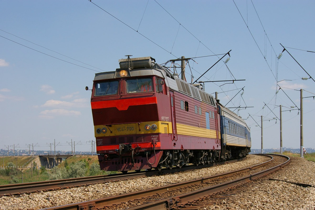 Электровоз ЧС4Т-700 с поездом, пассажирский обход Батайска